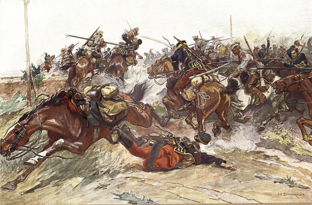 Дело у Вафангоу. 17 мая 1904